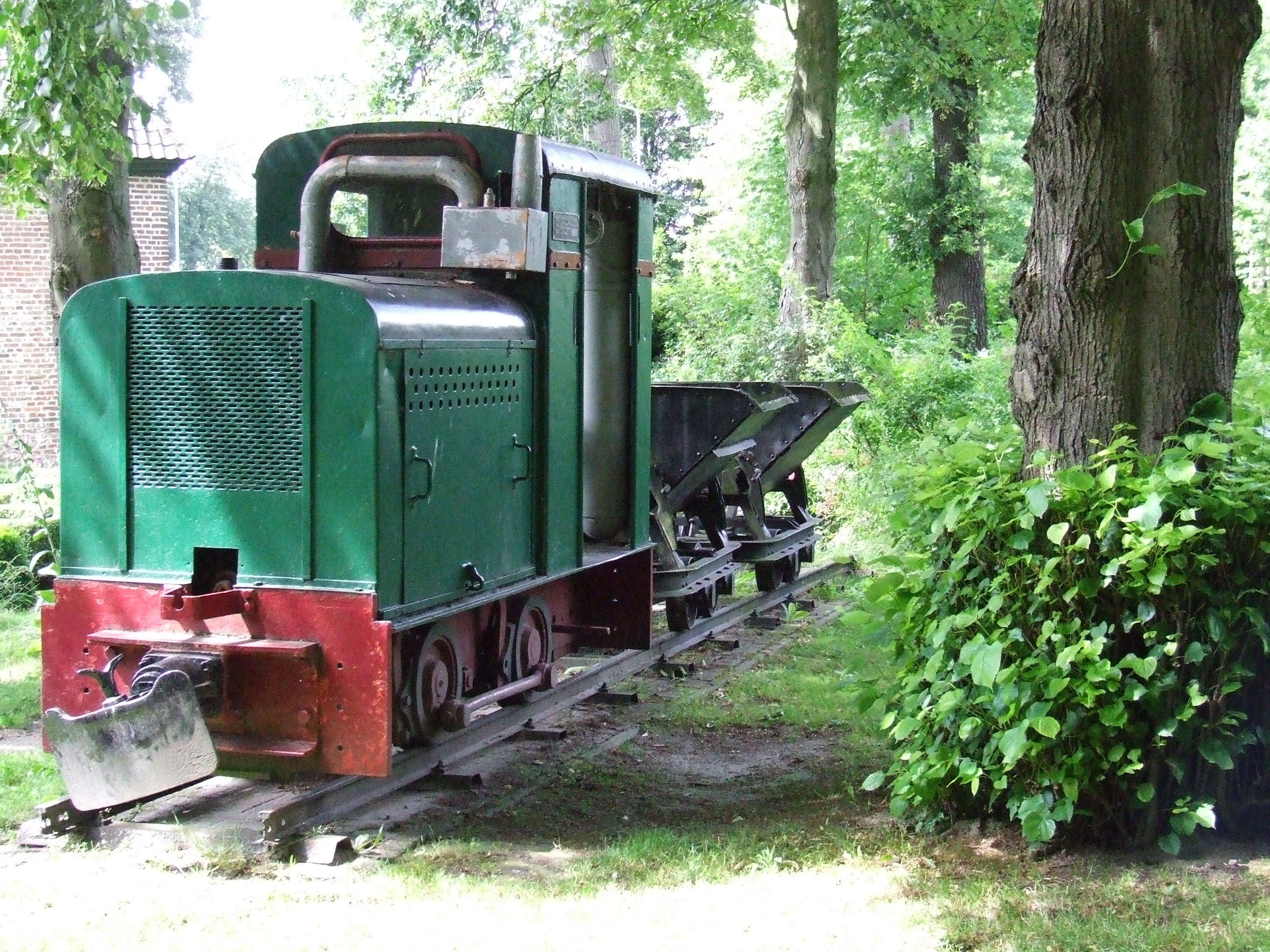 Foto van kleitrammetje bij kasteel Holtmuhle in Tegelen